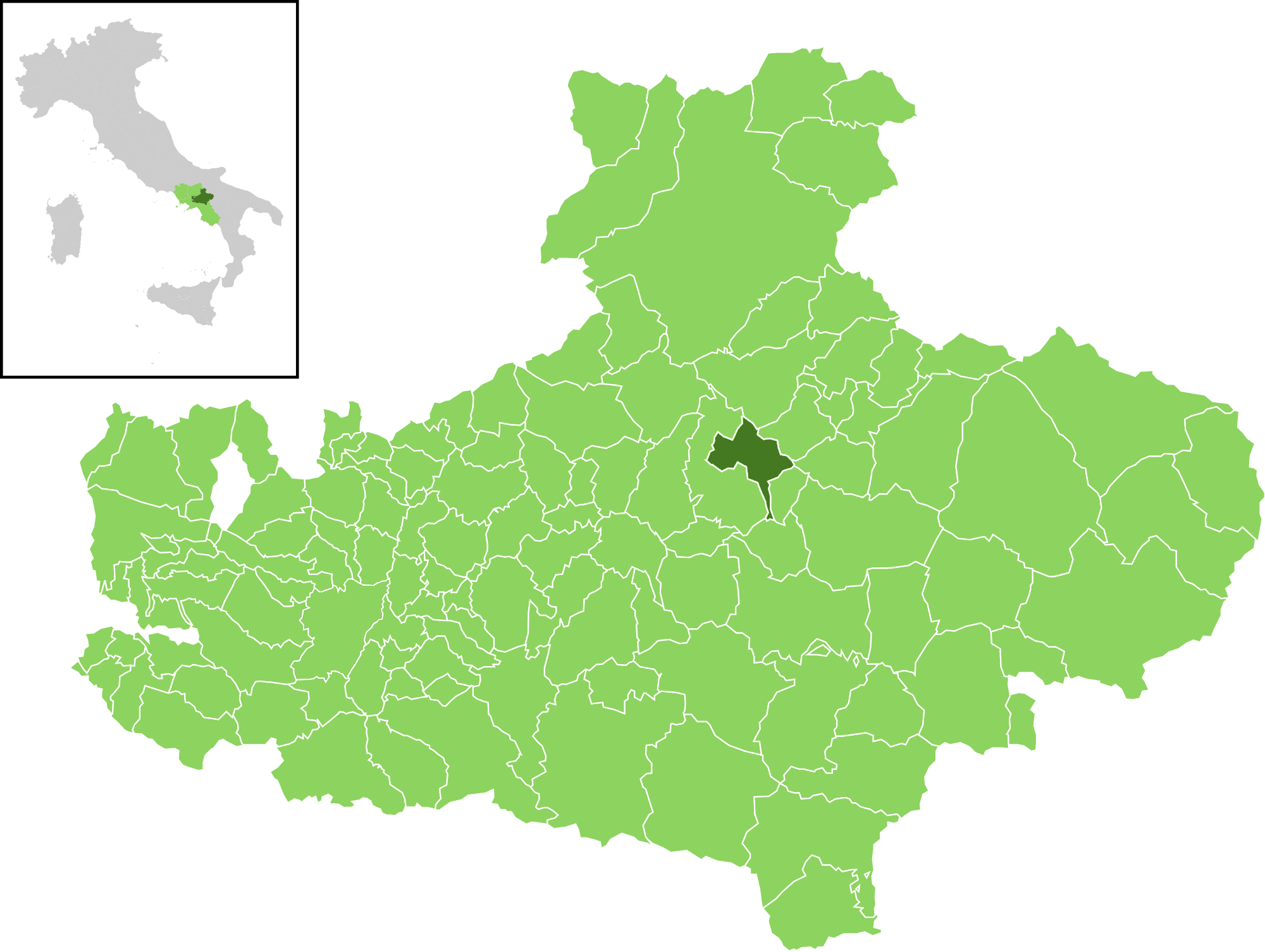 mappa del territorio del Comune di Sturno (AV)